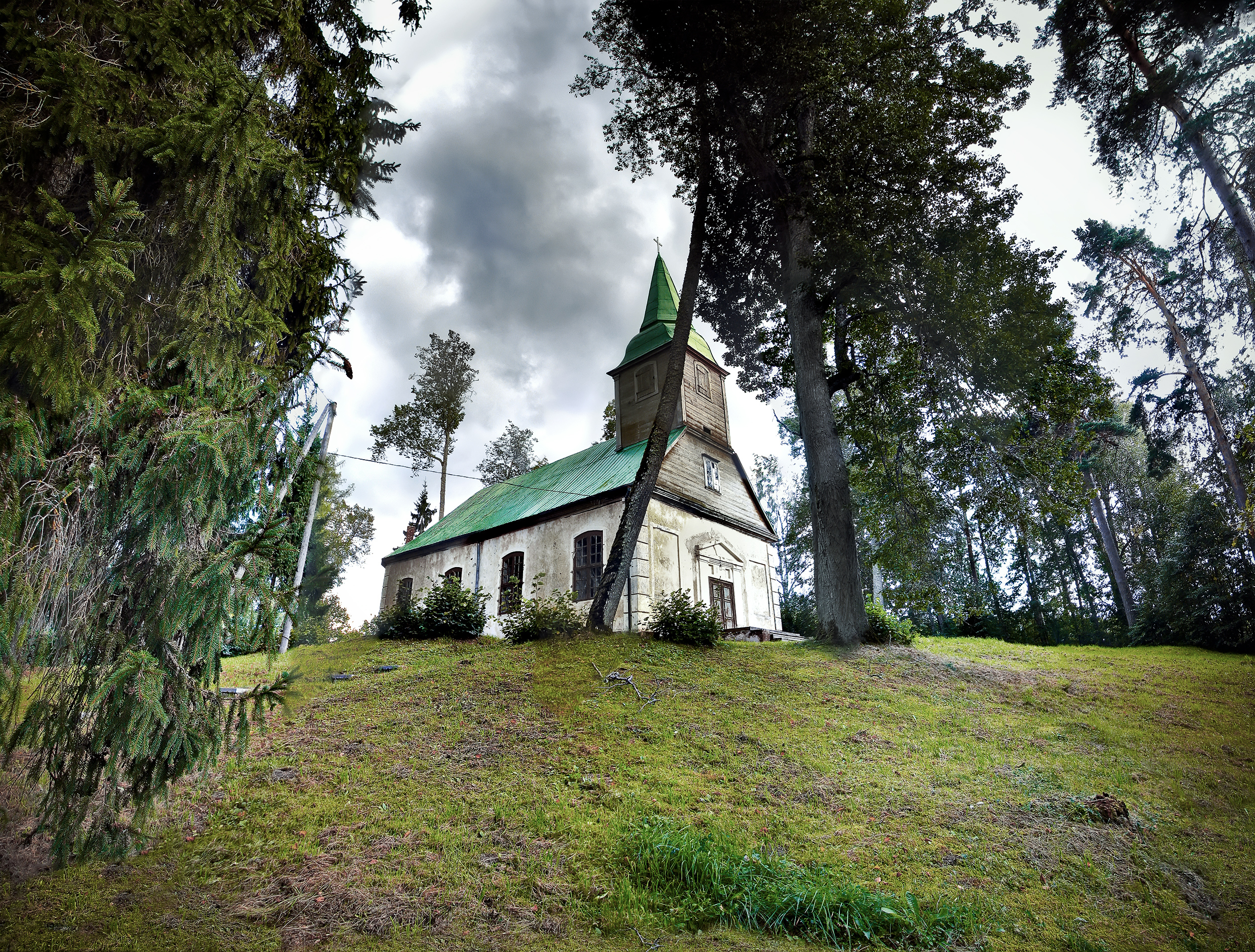 Meņģeles pagasts, Latvia